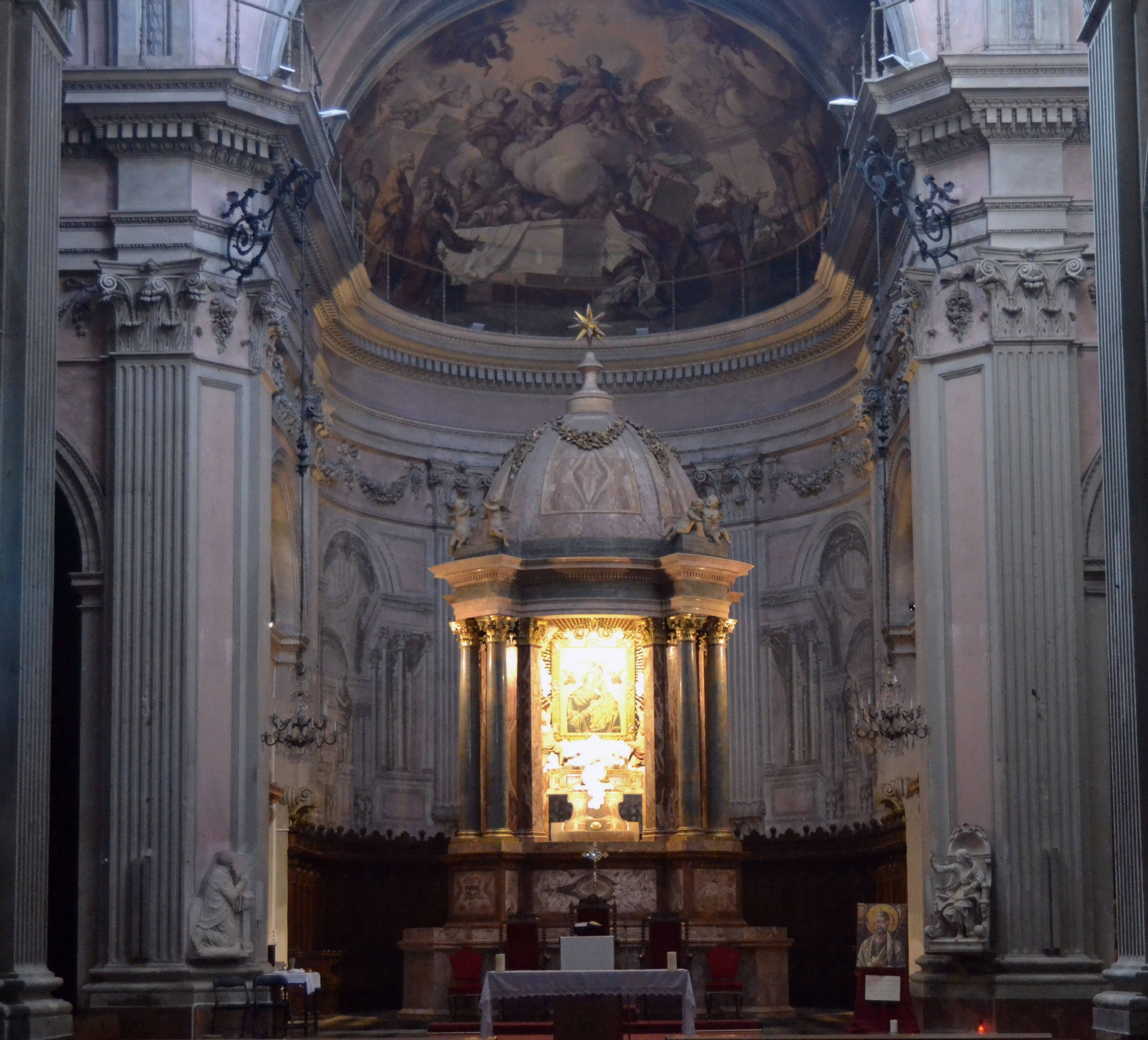 Vista cap a l'altar, església del Temple de València.